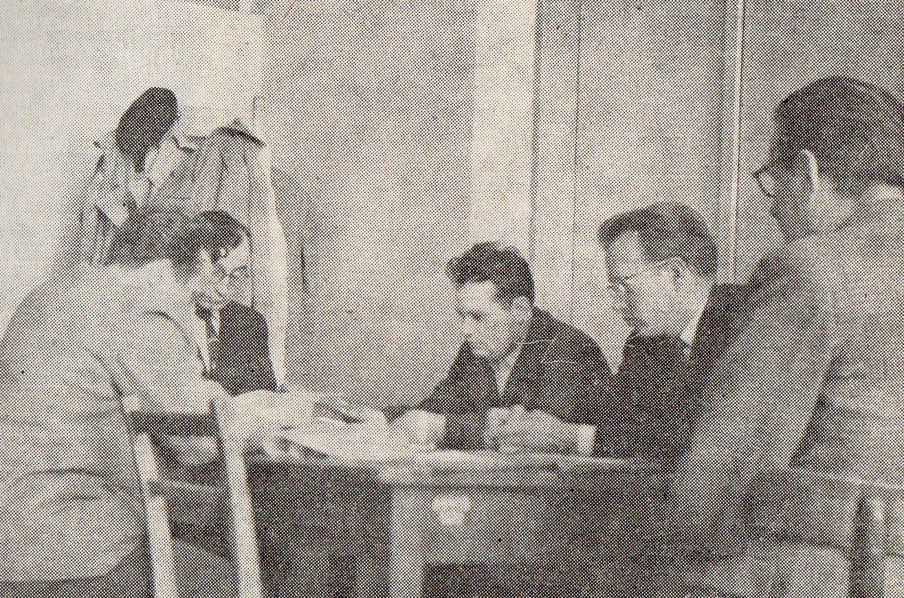 Posiedzenie spółdzielni mieszkaniowej HCP w Poznaniu w 1958r.